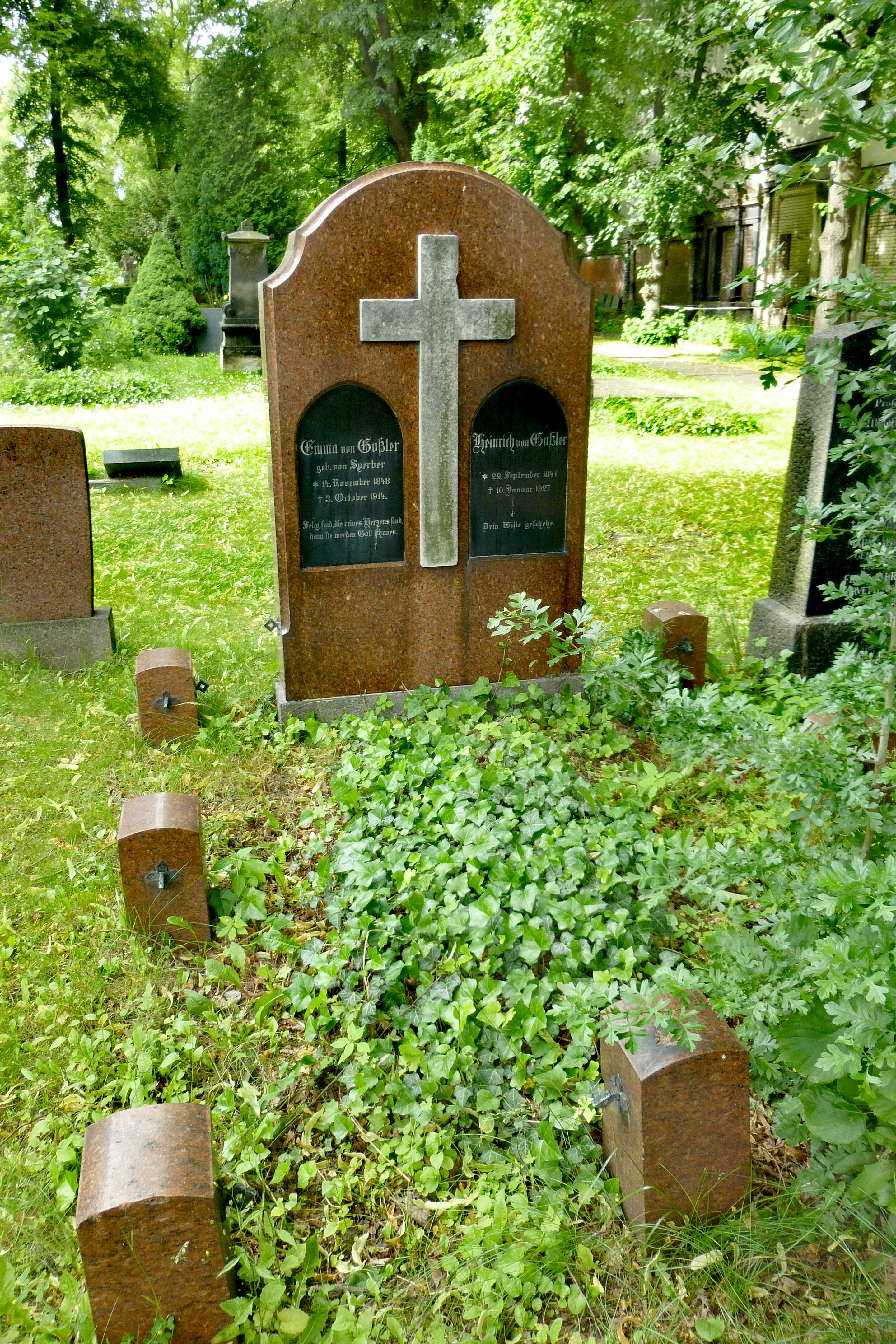 Grabstätte Heinrich von Goßler / preußischer General und Kriegsminister / Alter St.-Matthäus-Kirchhof Berlin / Foto: Wolfgang Schindler